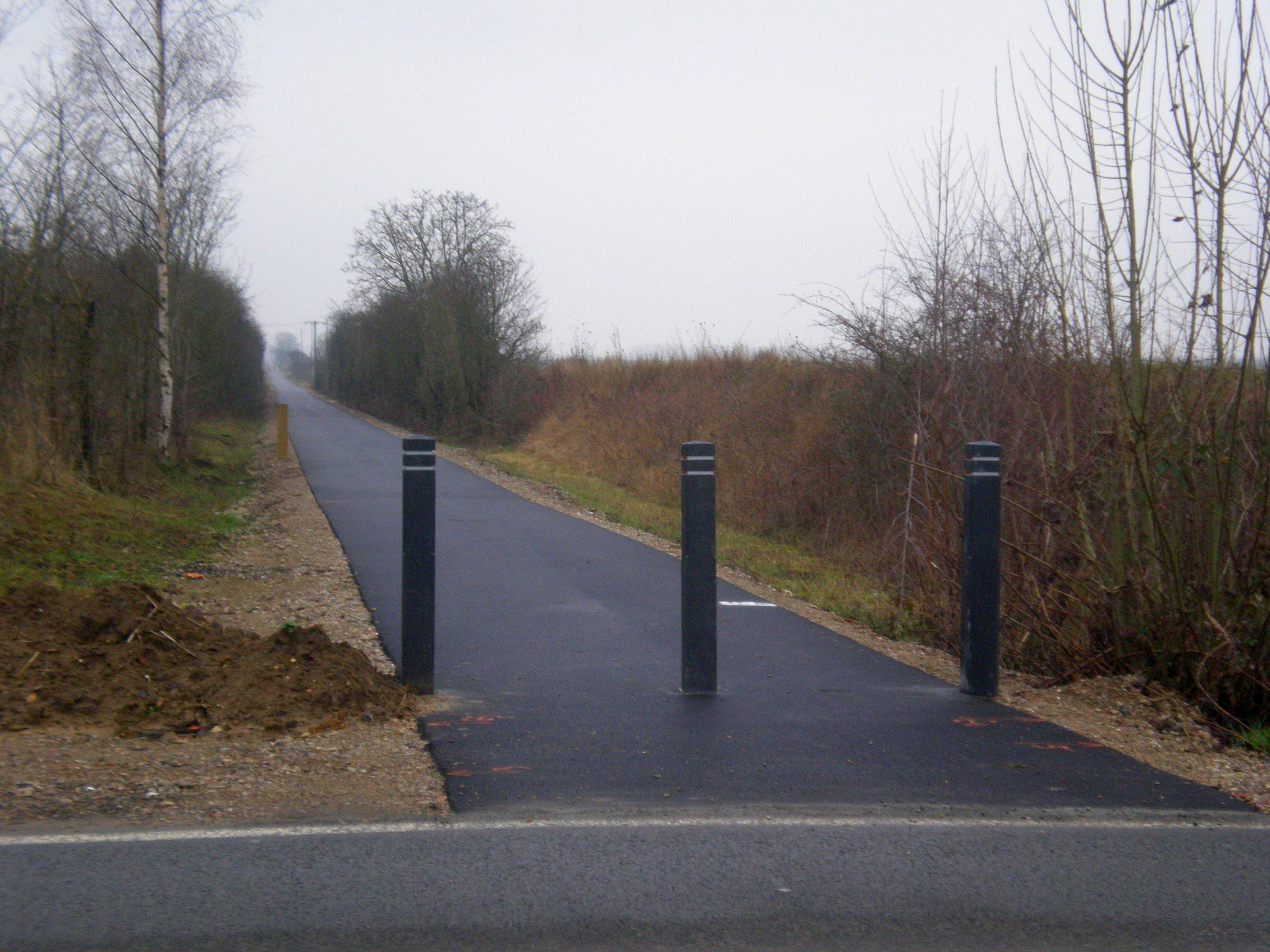 Voie verte de la Trans'Oise à La Rue-Saint-Pierre (Oise) réalisée à l'emplacement de l'ancienne ligne Rochy-Condé - Soissons.